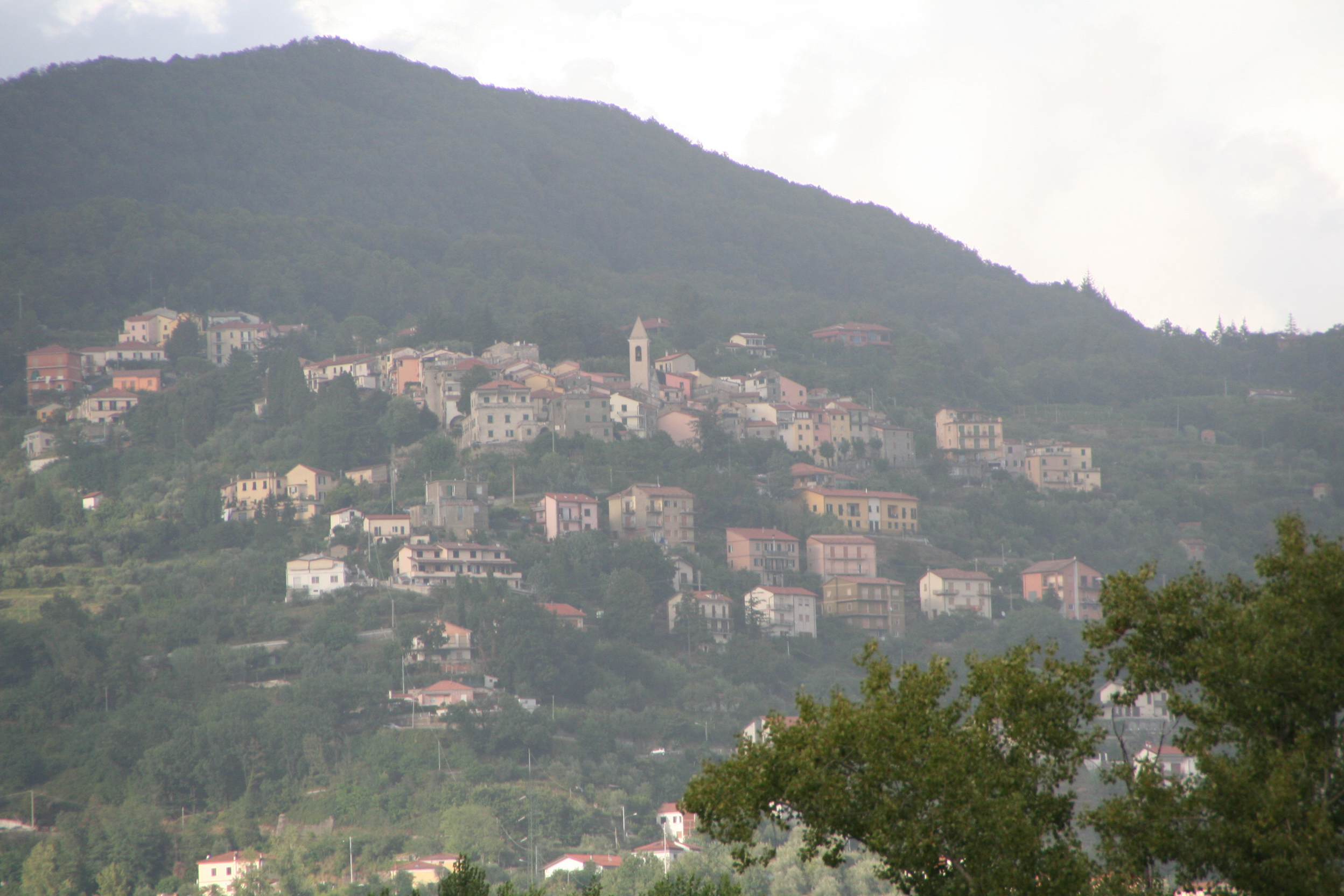 il paese di Bolano